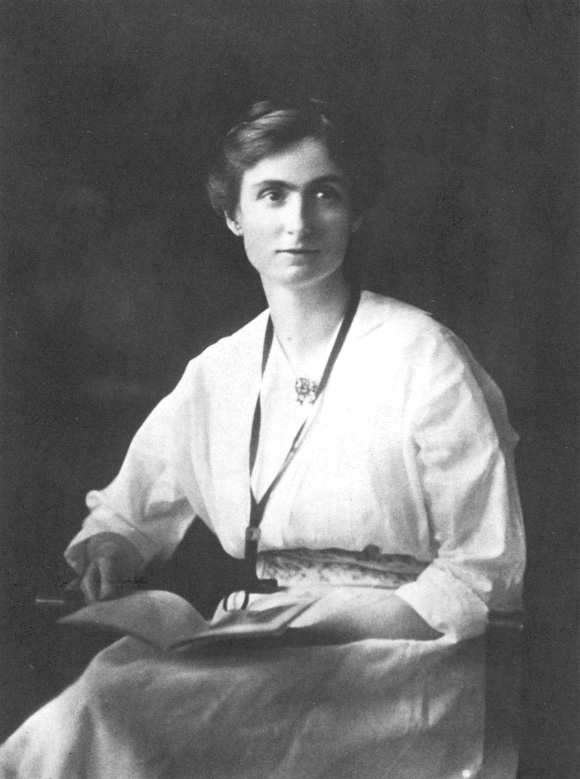 Эдит ЭбботтАмериканский социальный работник, педагог, экономист.